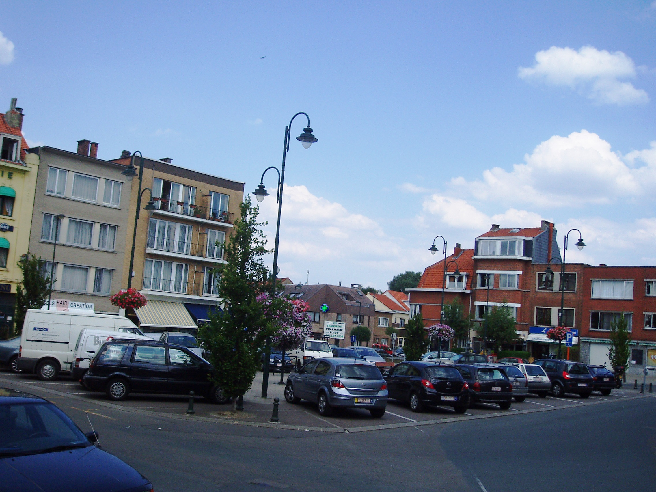 place Edouard Pinoy Auderghem Belgium